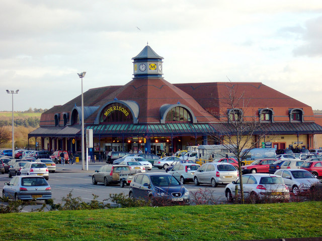 Morrison's